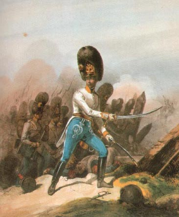 Offizier der ungarischen Grenadiere der k.k. österr.-ungar. Armee Mitte des 19.Jahrhunderts